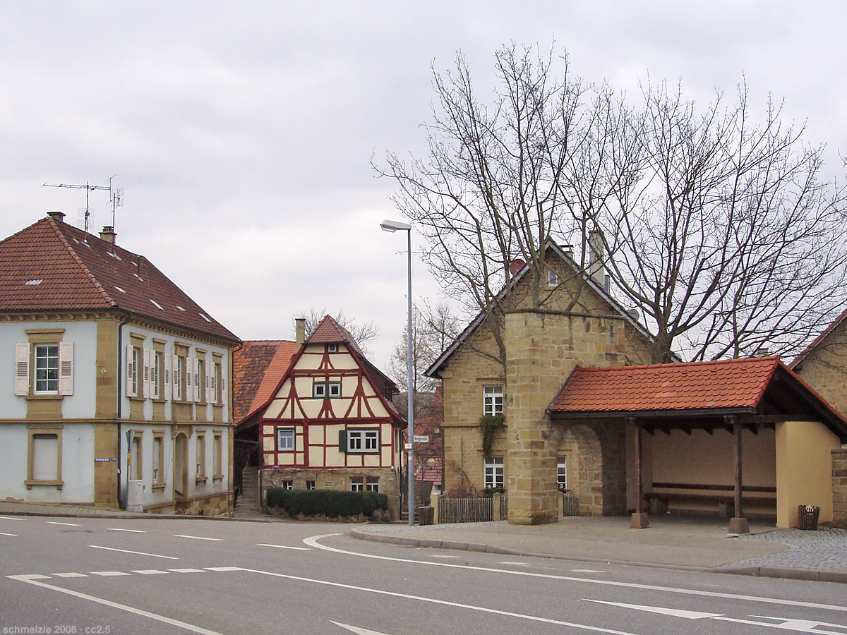 Ehemaliges Oberes Tor in Kürnbach